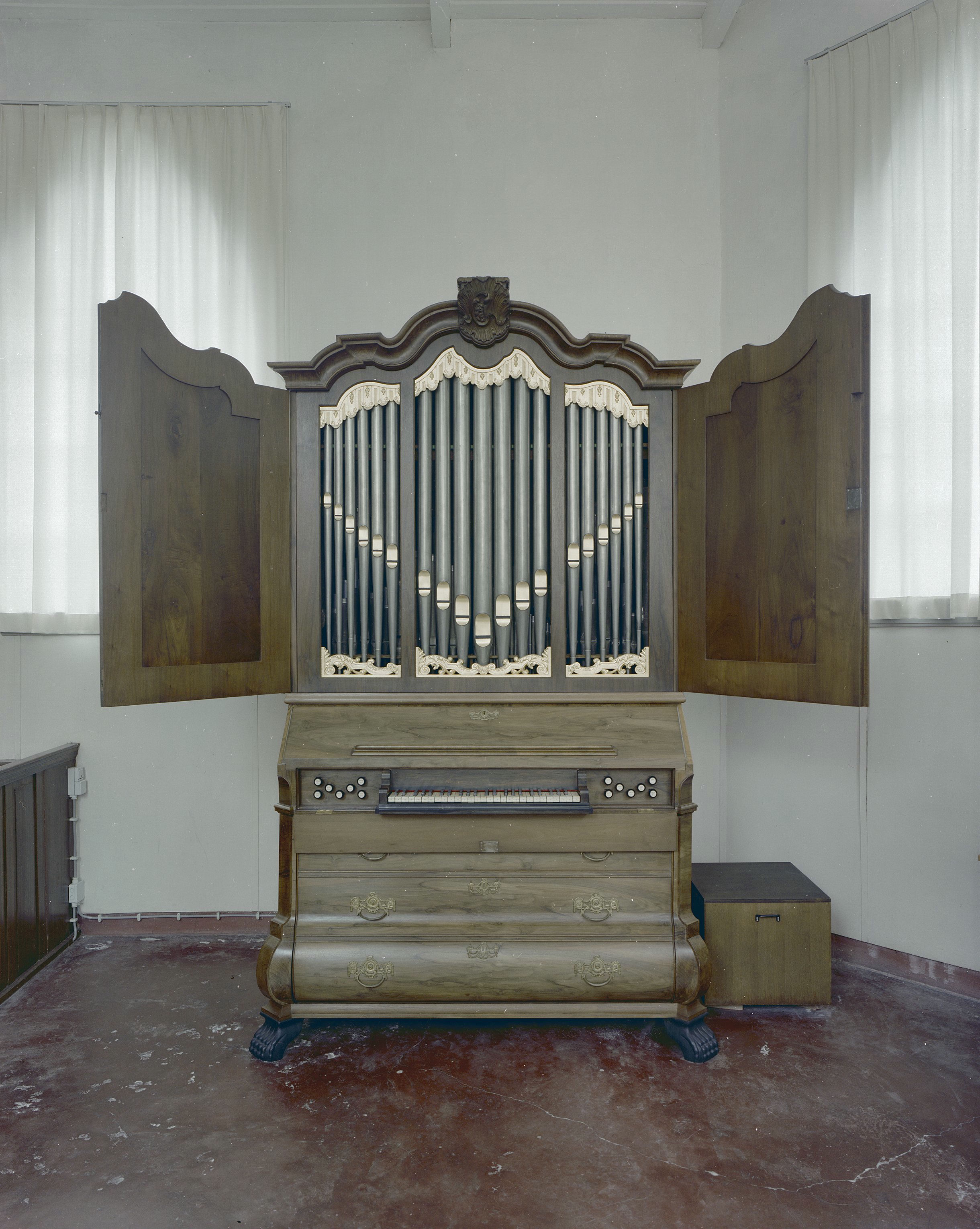 Doopsgezinde kerk: Interieur, aanzicht kabinetorgel met open orgelkas, orgelnummer 979 (opmerking: Gefotografeerd voor Het Historische Orgel in Nederland 1726-1769, bladzijder 280)